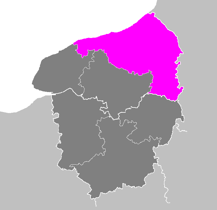 Maps of arrondissements and cantons of France: Arrondissement de Dieppe.PNG